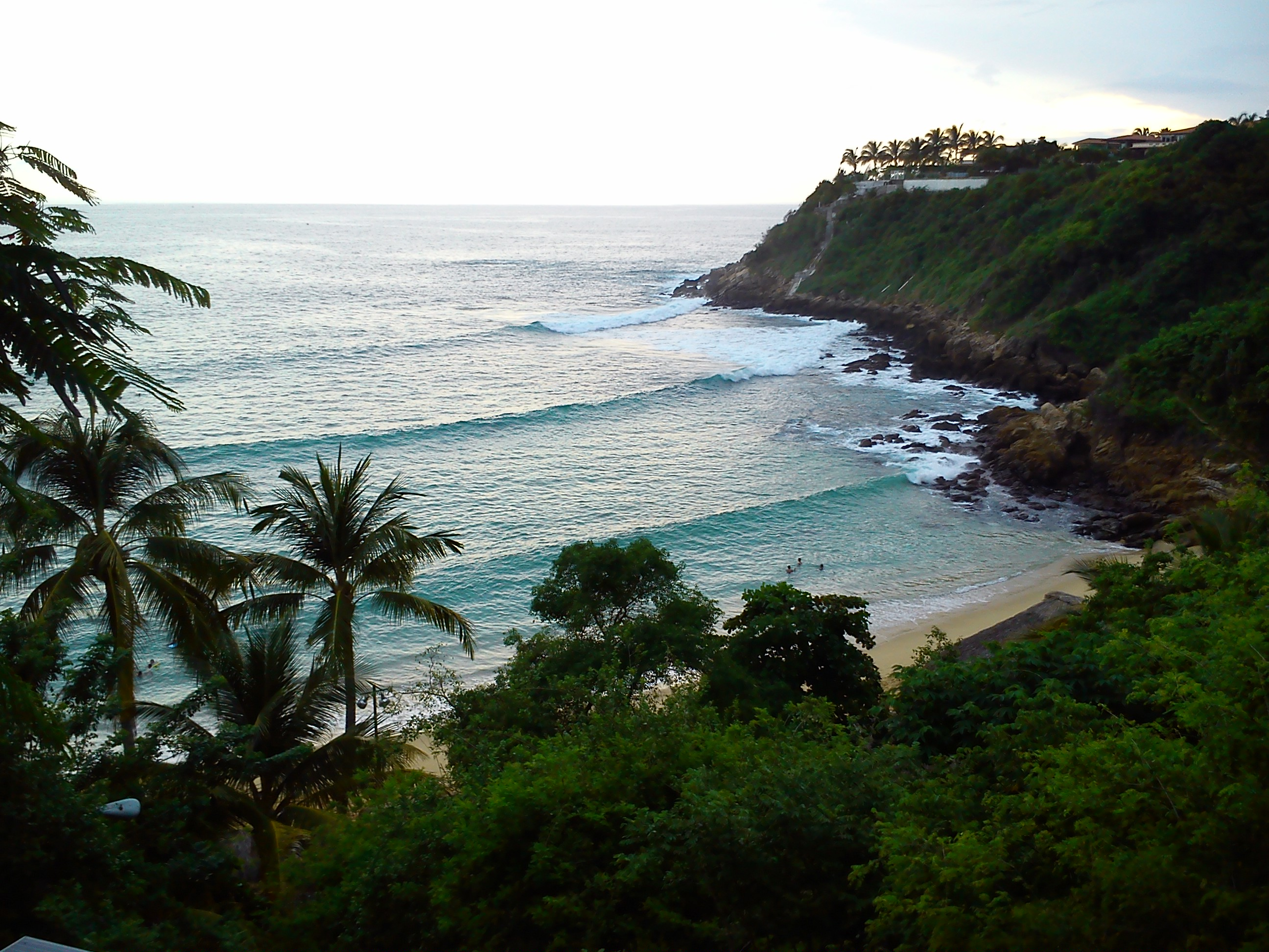 Ubicada en Puerto Escondido, Oaxaca, México